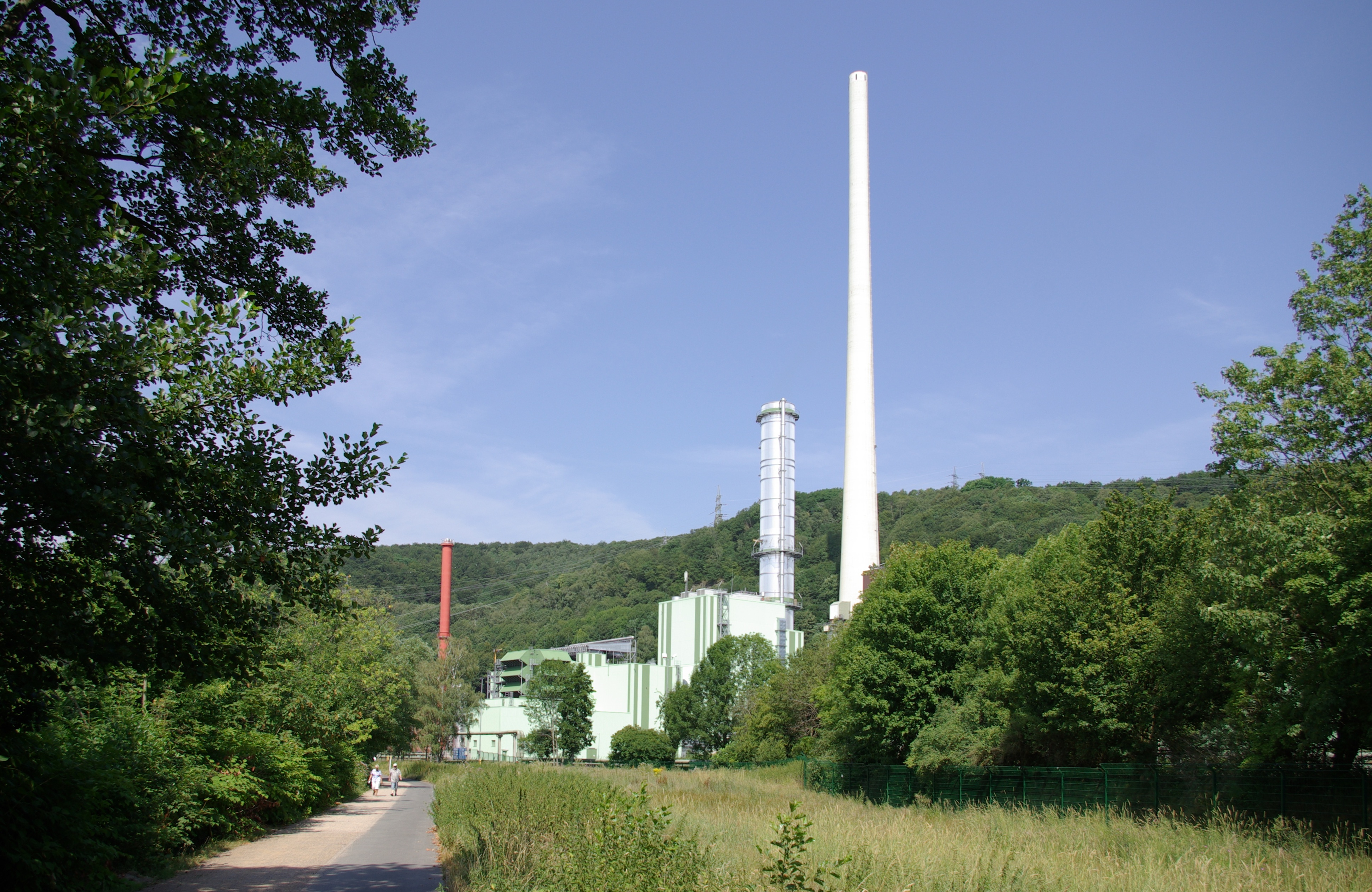 Cuno-Kraftwerk am Harkortsee in Herdecke